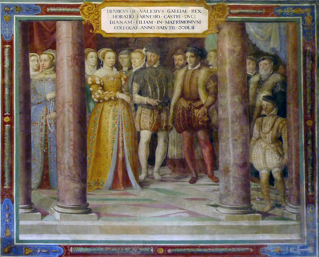 Fresko mit der Darstellung der Heirat Dianes de France mit Orazio Farnese